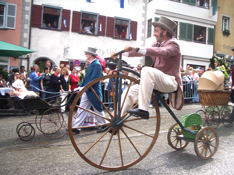 Ravensburg, Germany: Rutenfest, Hochrad